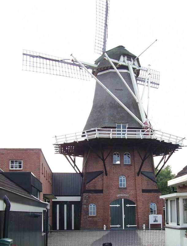 Molen Grenszicht te Emmer-Compascuum. Foto genomen door Marco Roepers op 29-7-2005